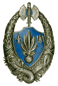 Insigne régimentaire du 5e REI - Type 1